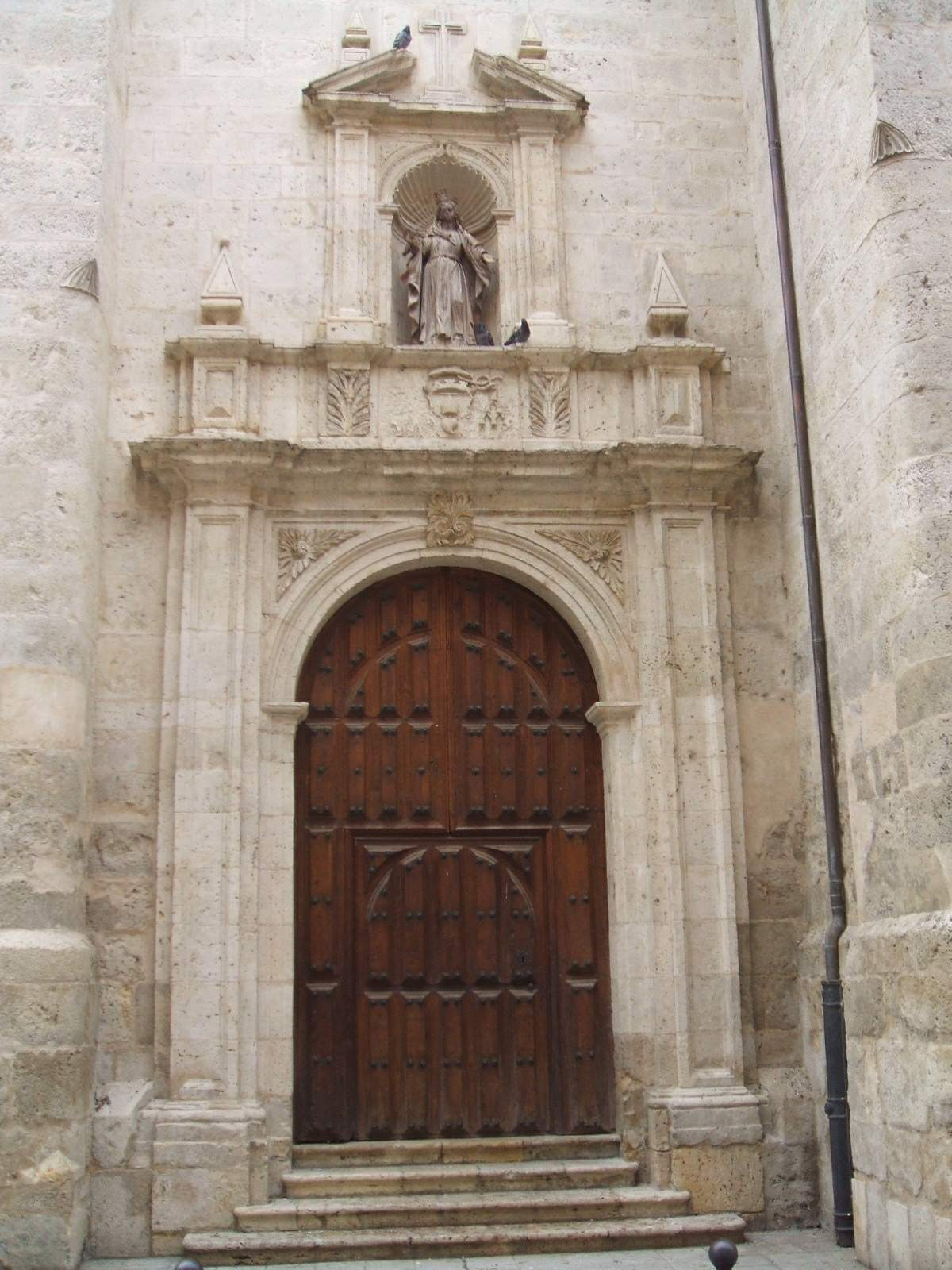 Convento de las Agustinas Recoletas (Palencia)